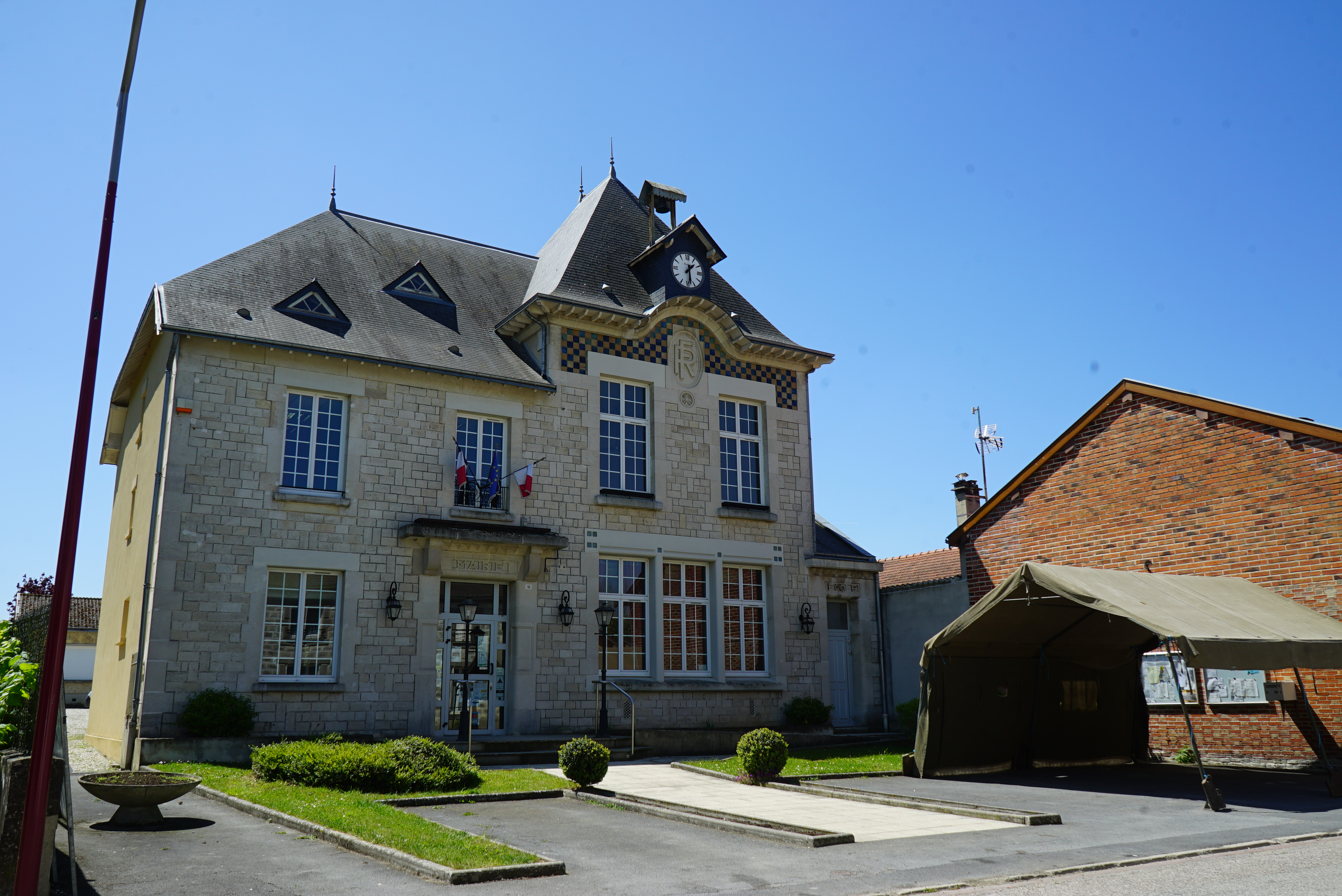 mairie d'auve